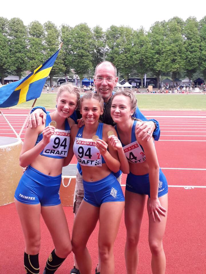 Flickor 17 vinner SM-guld i stafett-SM 2018.